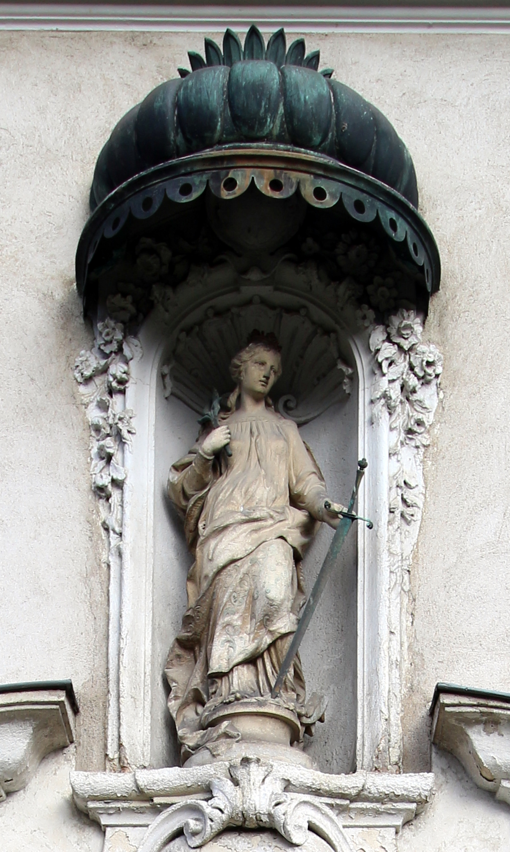 Statue der hl. Katharina von Alexandria über dem Portal der Filialkirche Fahrafeld, Niederösterreich.